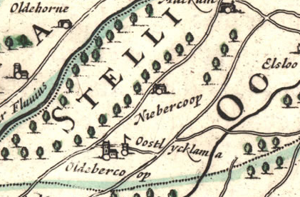 Detail kaart van Frisia in de Atlas Maior van Joan Blaeu met de kerk van Nijeberkoop